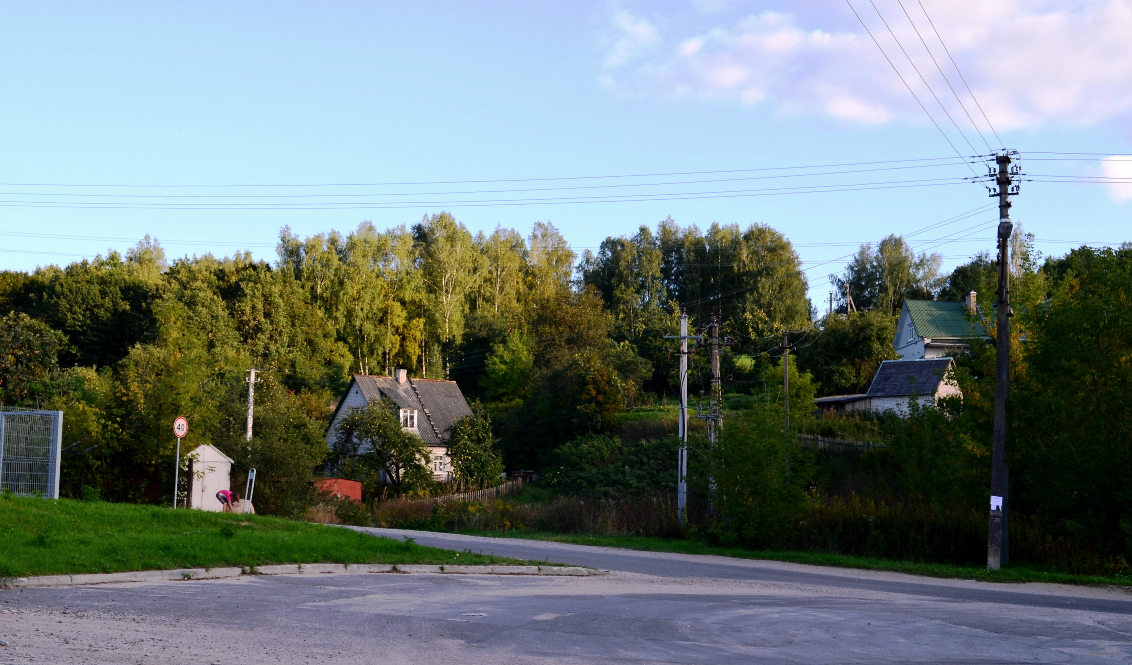 Žemoji g., Žemasis Pavilnys, Vilnius